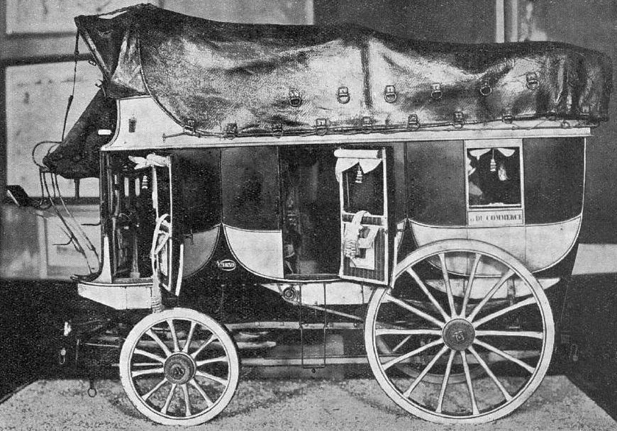 Une diligence à trois corps des Messageries du Midi et du Commerce de 1839 (maquette exposée à la Salle Toulousaine, en 1935).